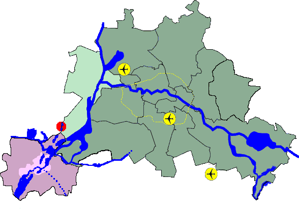 Ortsteillage Groß-Glienicke in Potsdam und Berlin